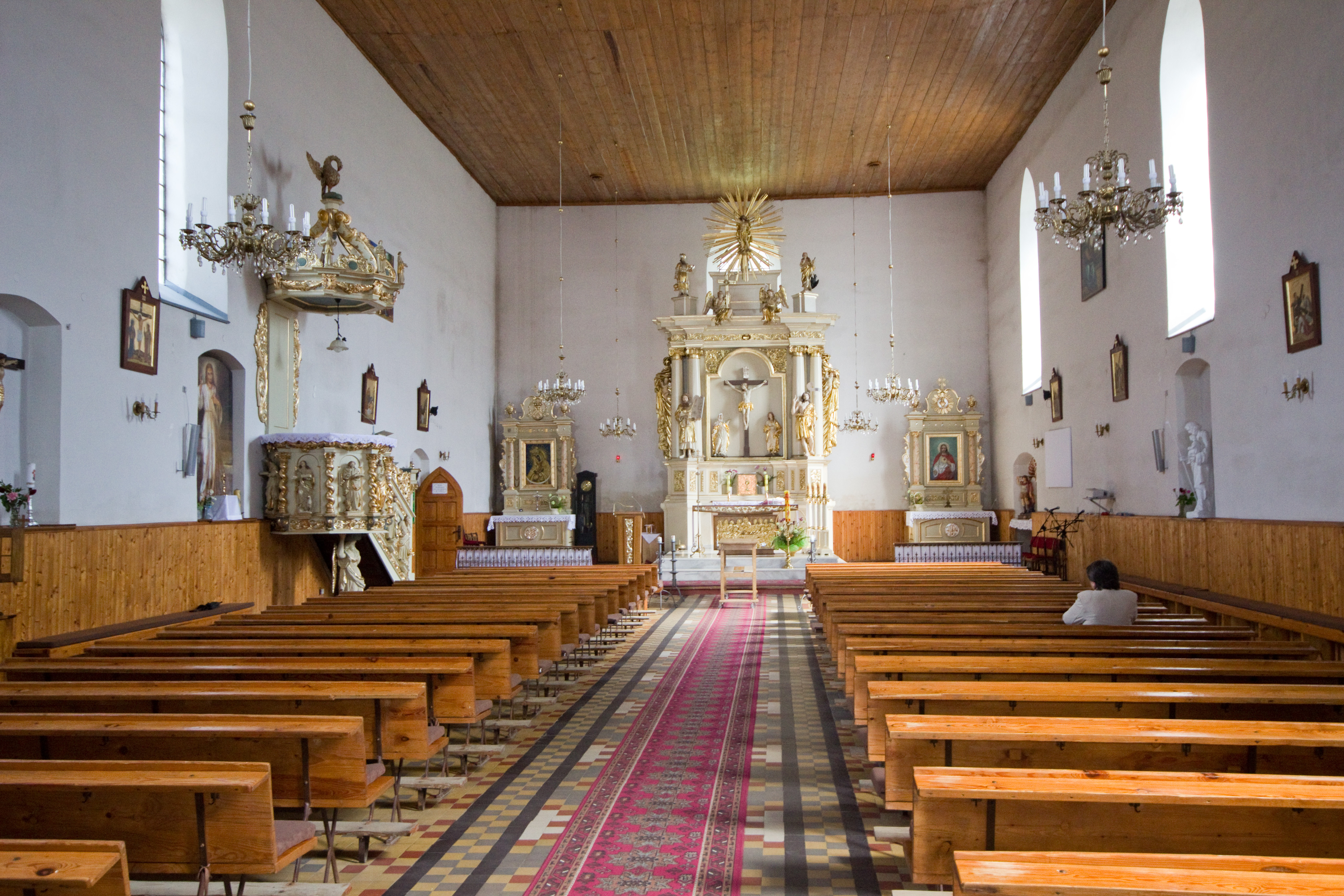 Kostel, Bartoszyce, gmina miejska, powiat bartoszycki, Varmijsko-mazurské vojvodství